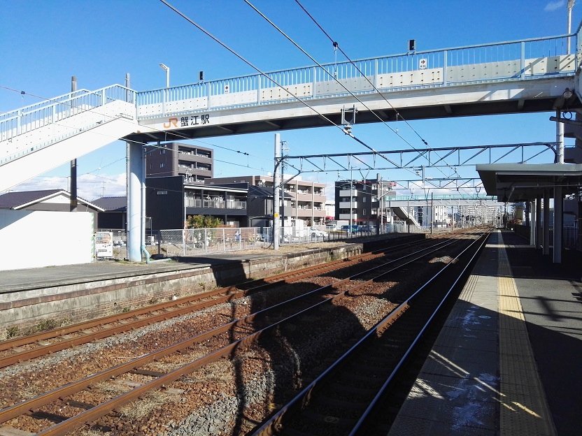 Kanie station platform